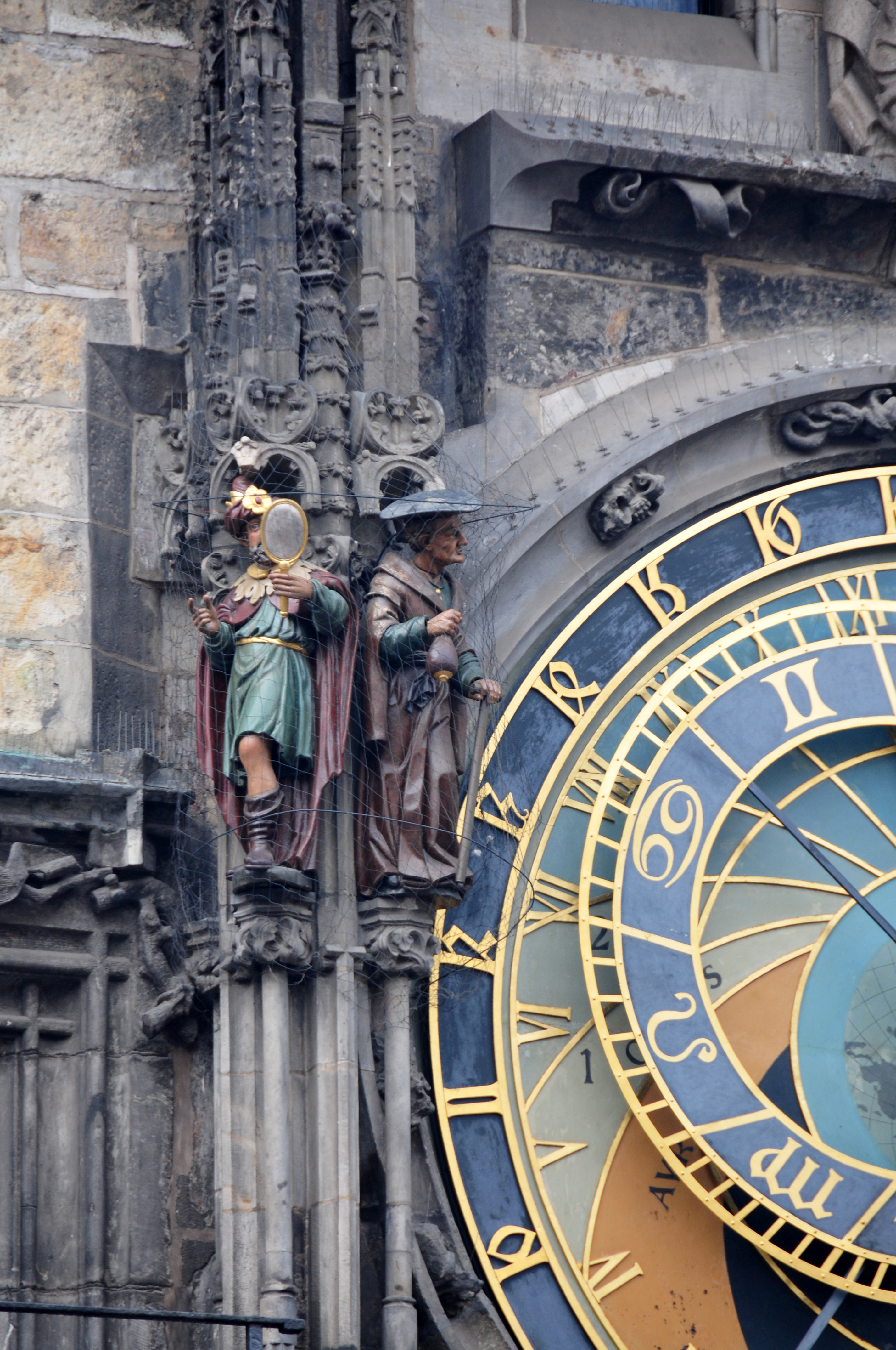 Prag